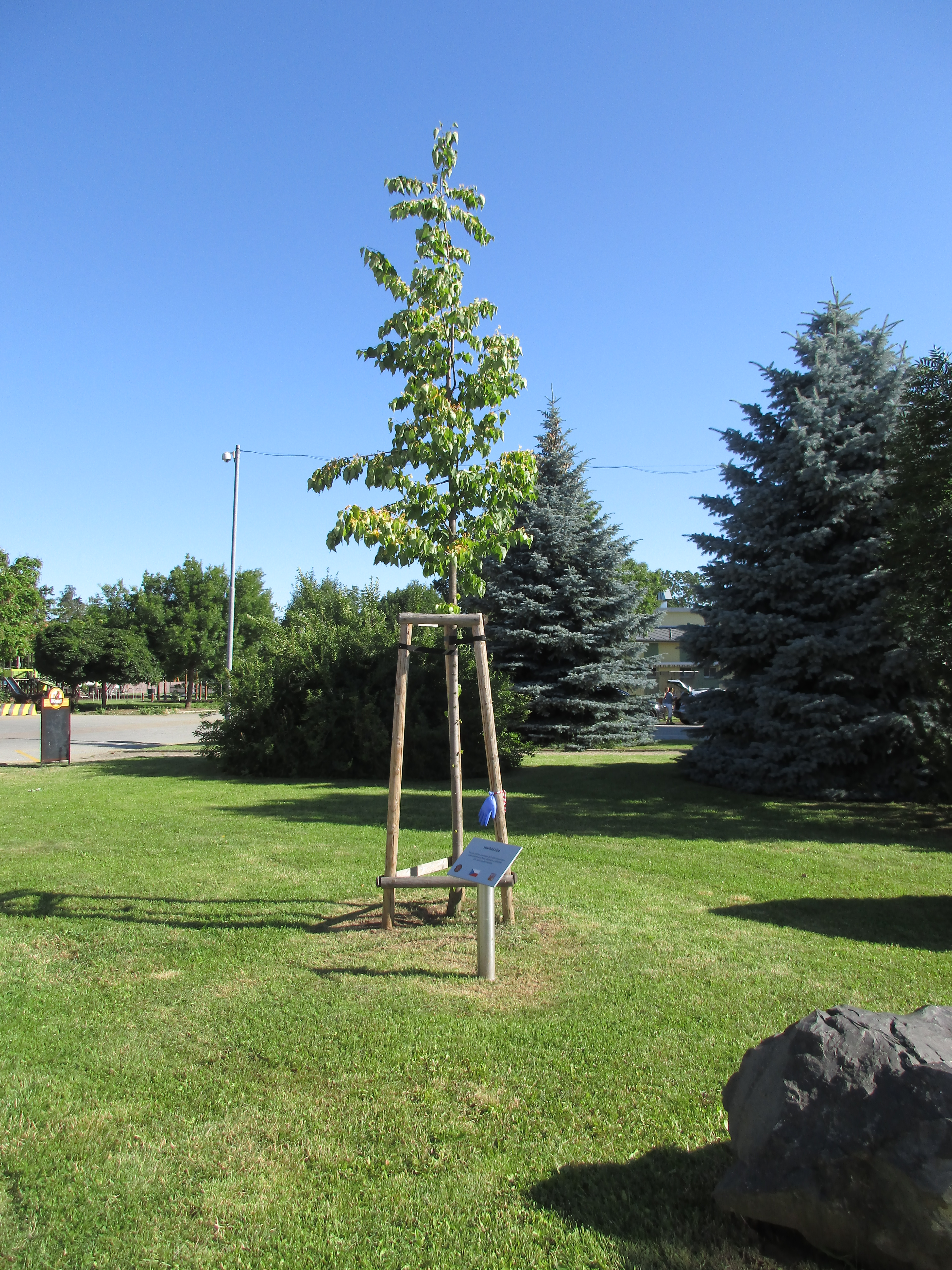 Lípa republiky. Praha 8 - Březiněves, U Parku. Vysazena 15. září 2018.